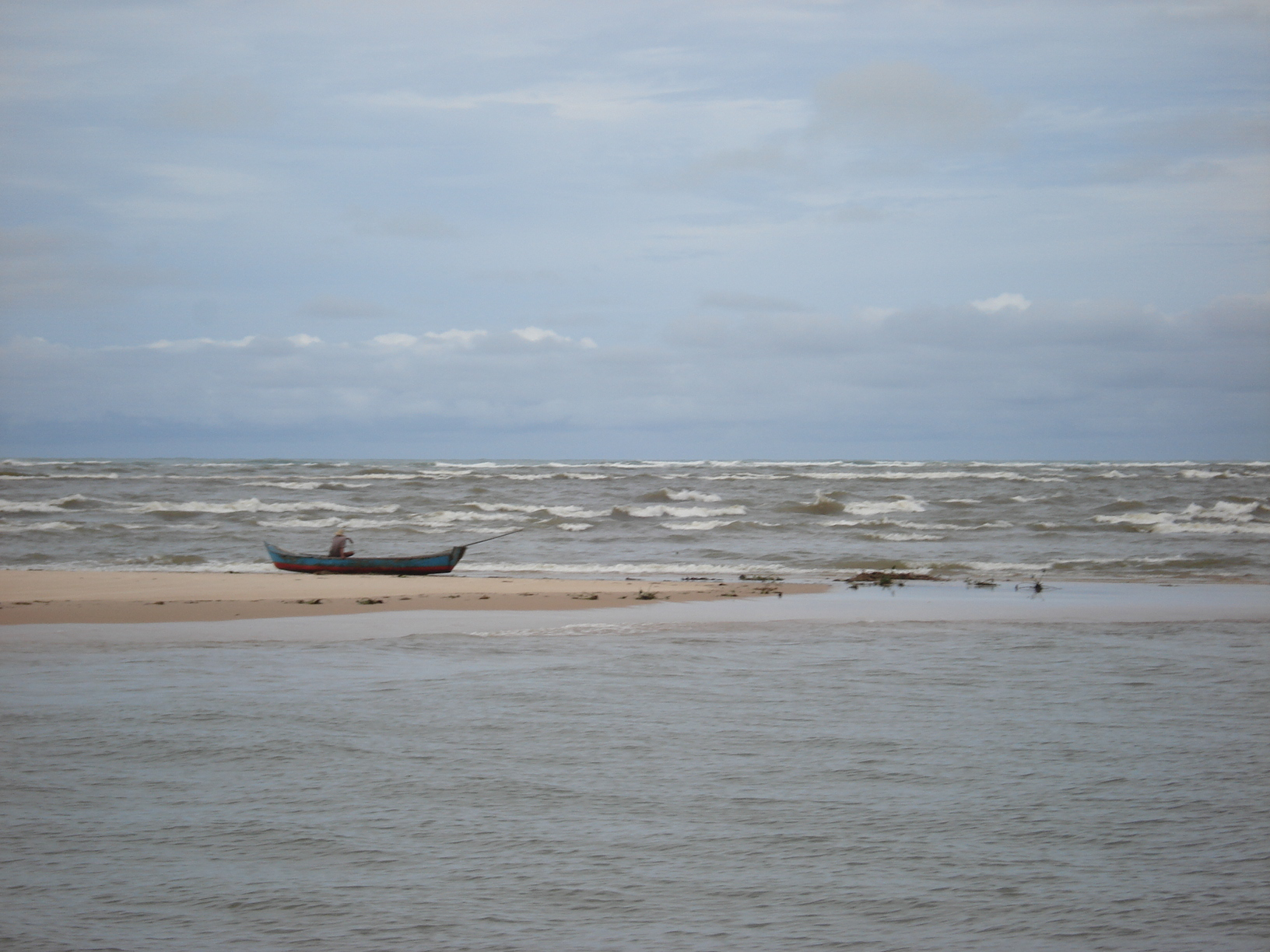 Encontro do Rio São Francisco com o Oceano Atlântico, em Alagoas.